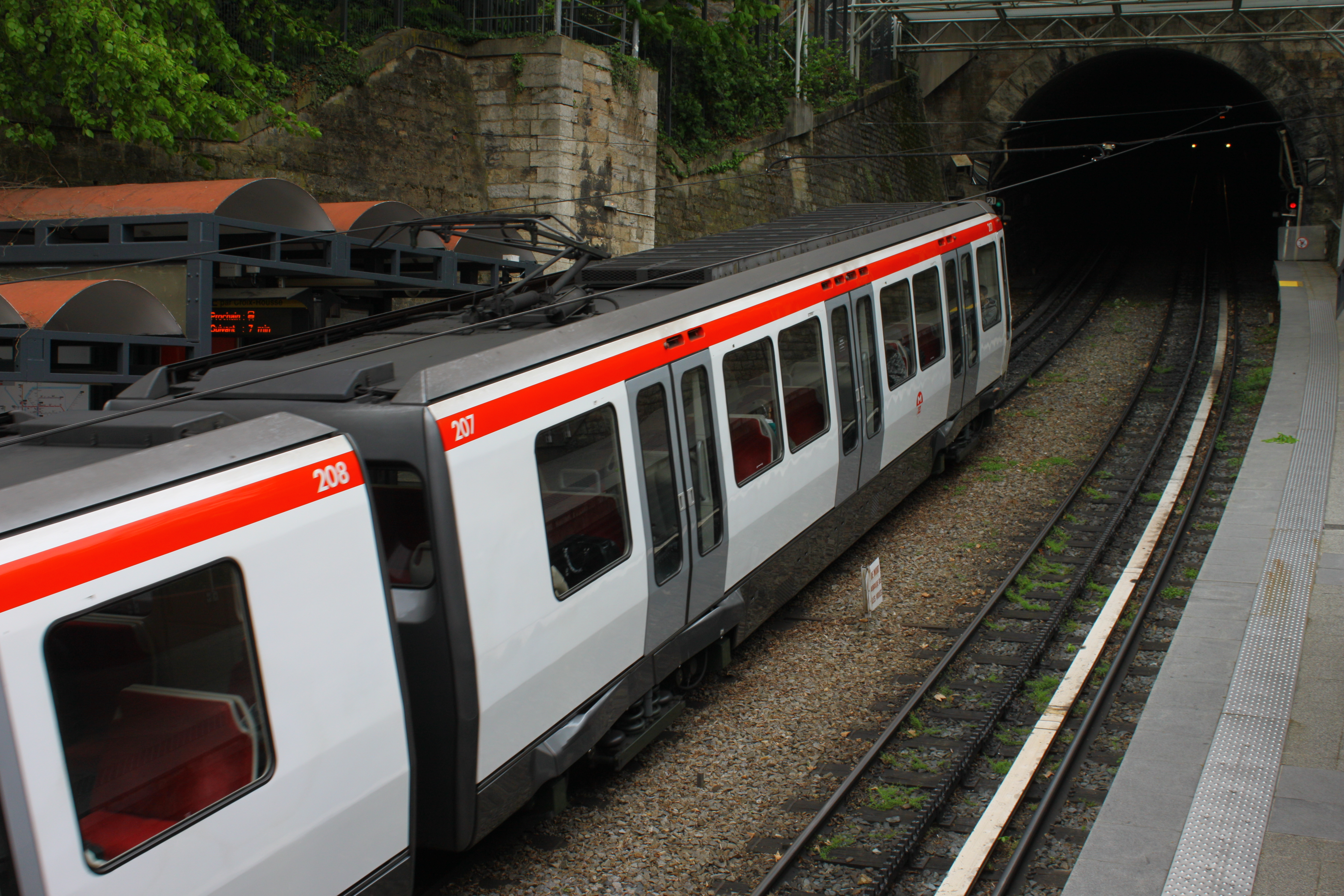 Un MCL 80 à la Station Croix-Paquet sur le Ligne C du Métro de Lyon.